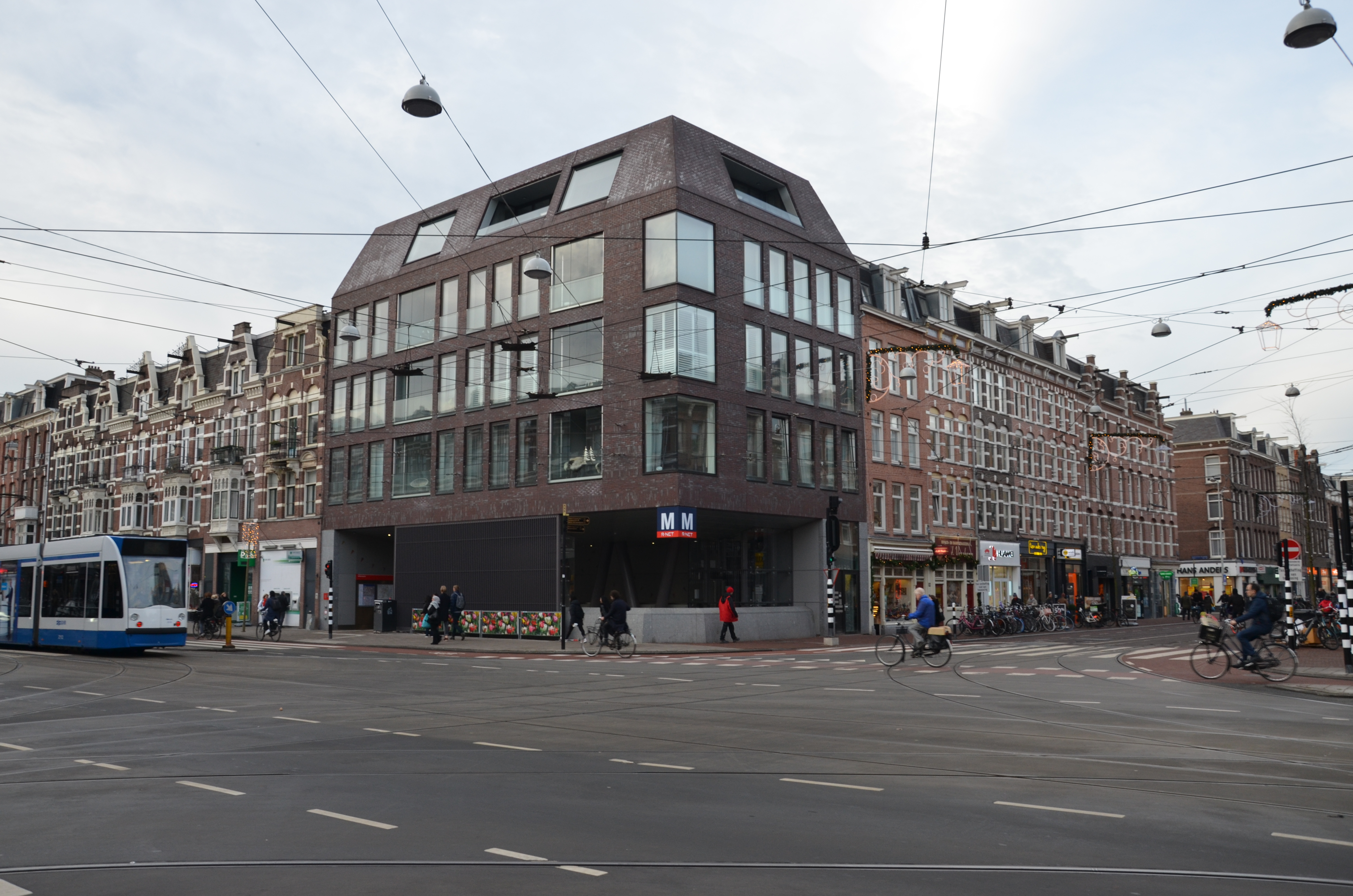 Metrostation De Pijp in Amsterdam.